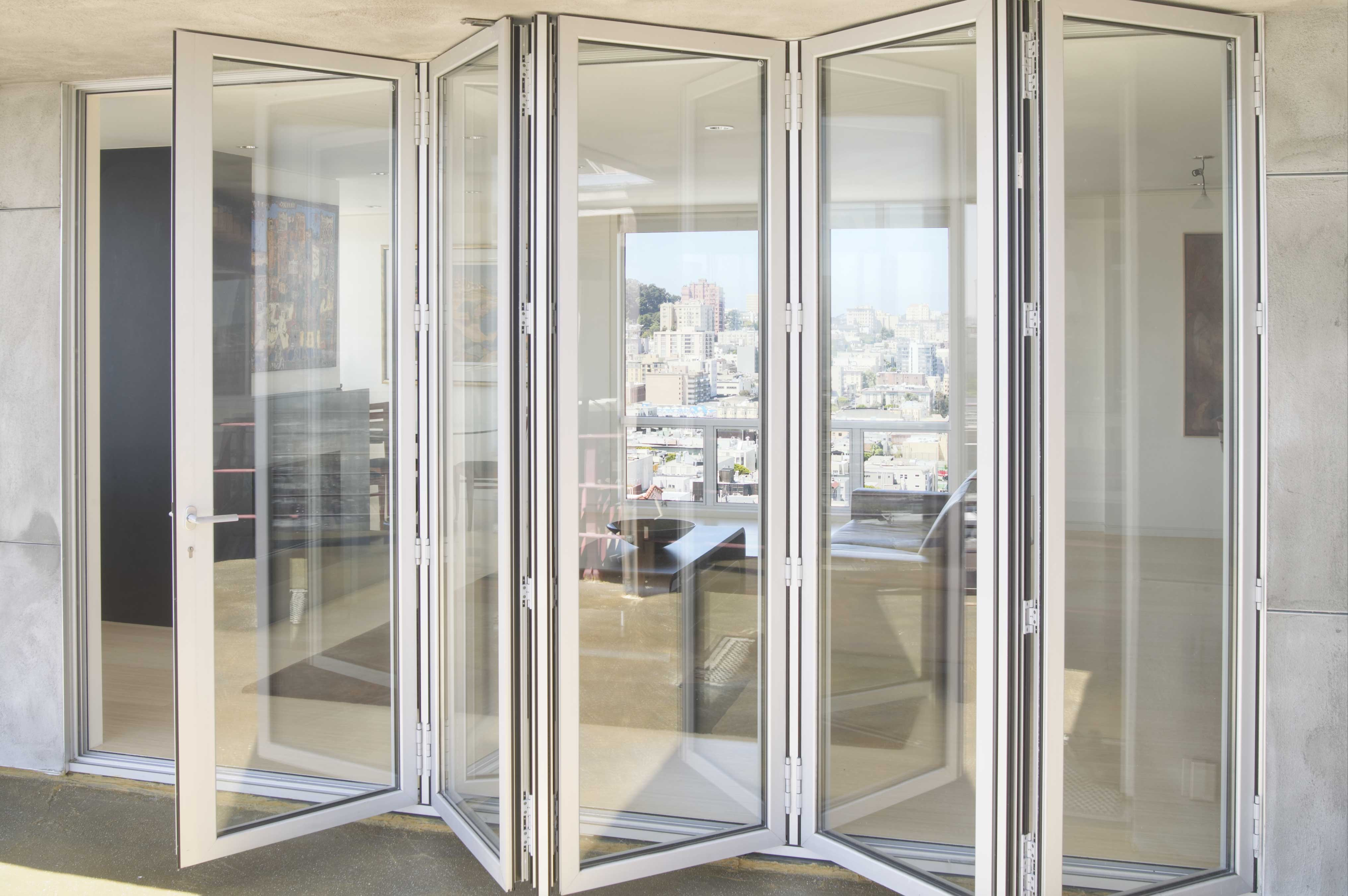 Solarlux Faltwand angefaltet